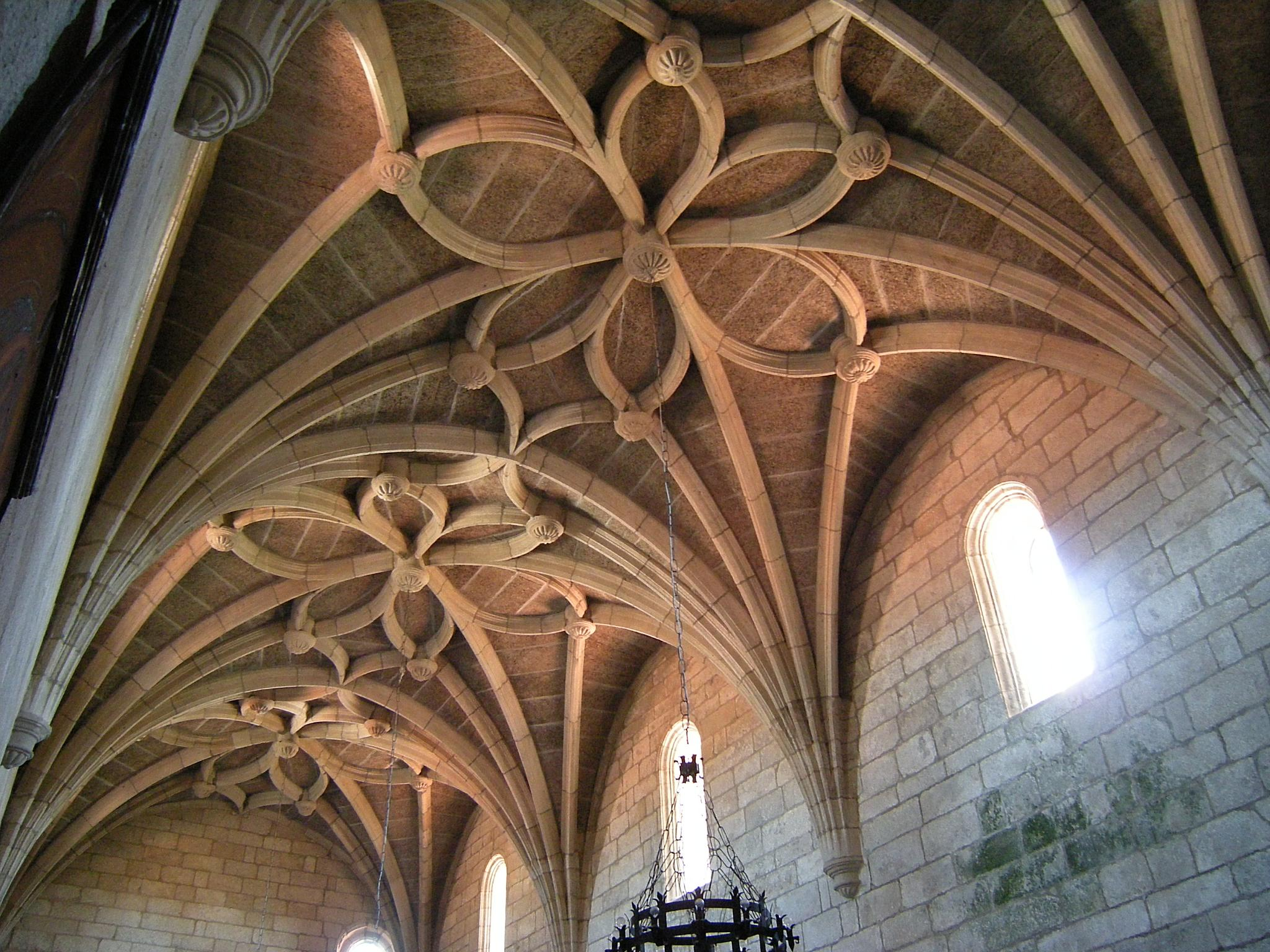 Bóvedas de crucería en el refectorio.